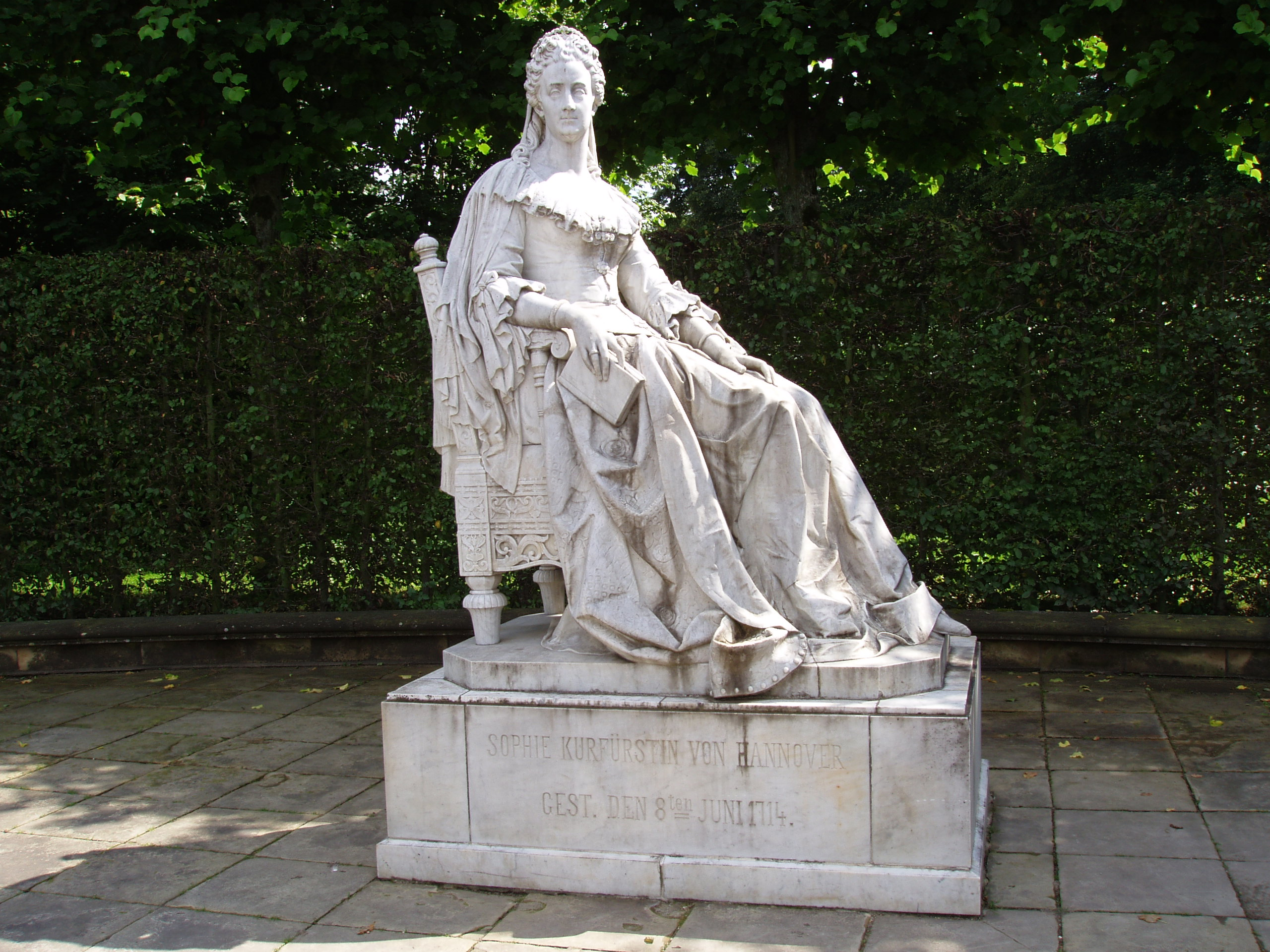 Princesse Sophie de Hanovre, statue située dans le Jardin Herrenhäuser à Hanovre.